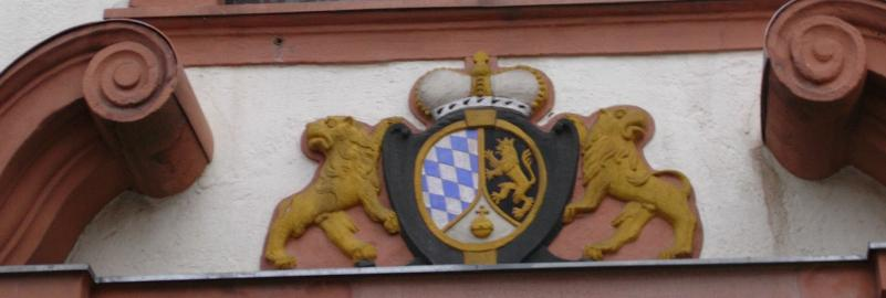 Kurpfälzisches Wappen über dem Südeingang der St. Remigiuskirche Ingelheim, GNU-FDL